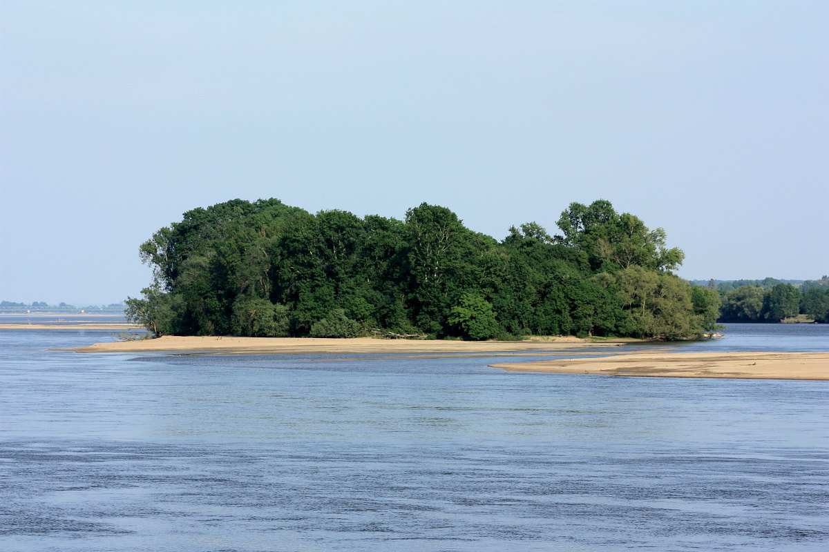 L'Île Sorin vue depuis la Levée Jeanne de Laval à La Bohalle